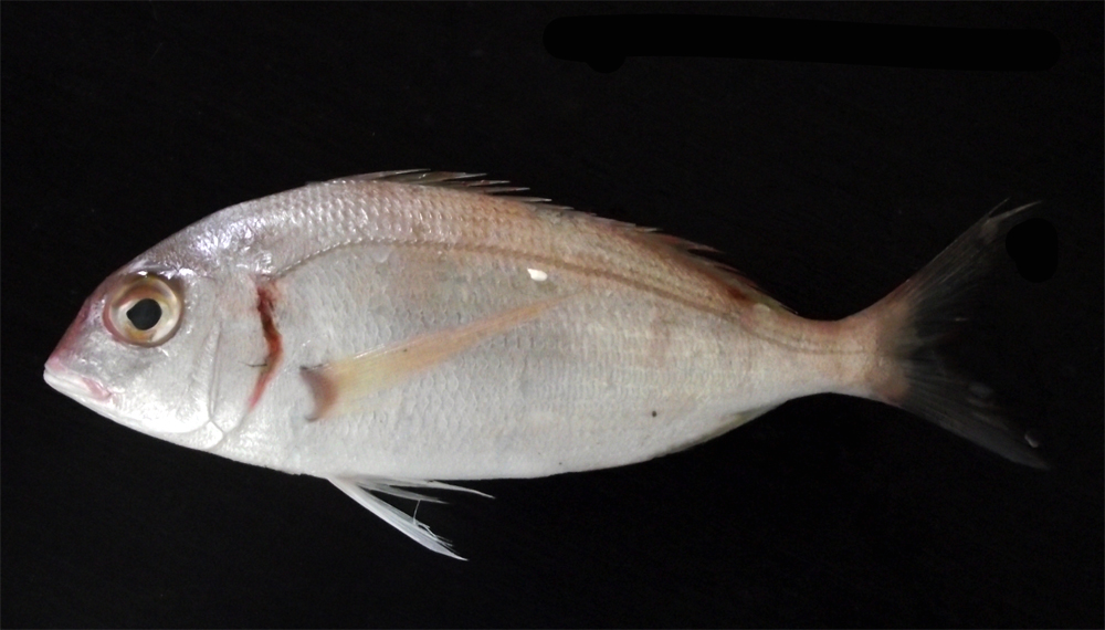 Pagellus erythrinus